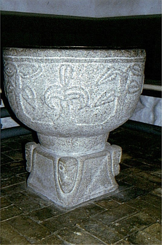 Fiskbæk Kirke døbefont, Viborg Kommune, Jylland, Denmark